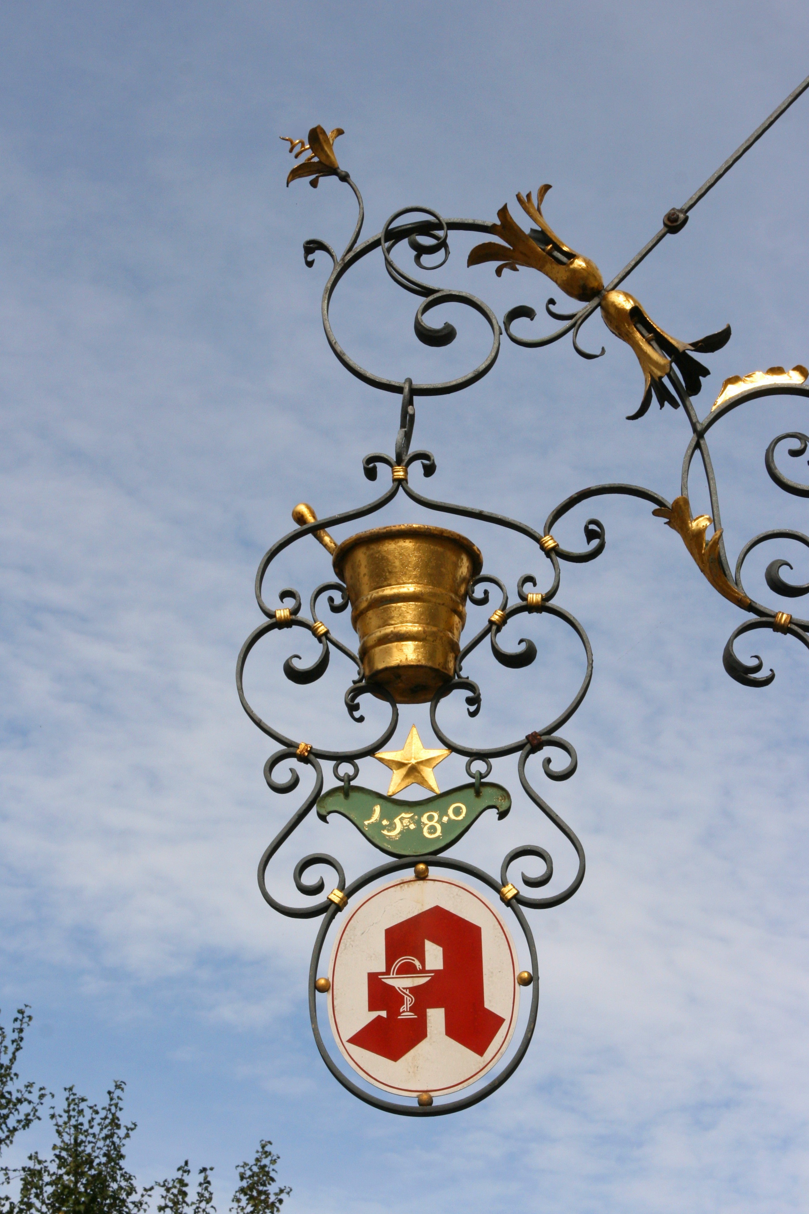 Stadtapotheke, Vorstadt 8 in Engen